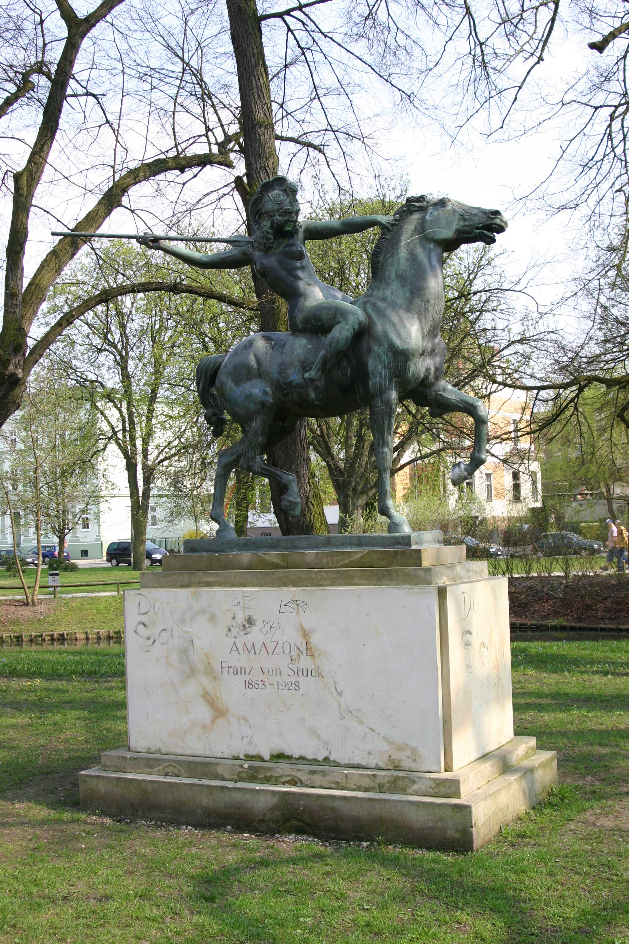 Franz von Stuck: Kämpfende Amazone (1897), Bronze, früher Carinhall, heute im Park Weidendamm